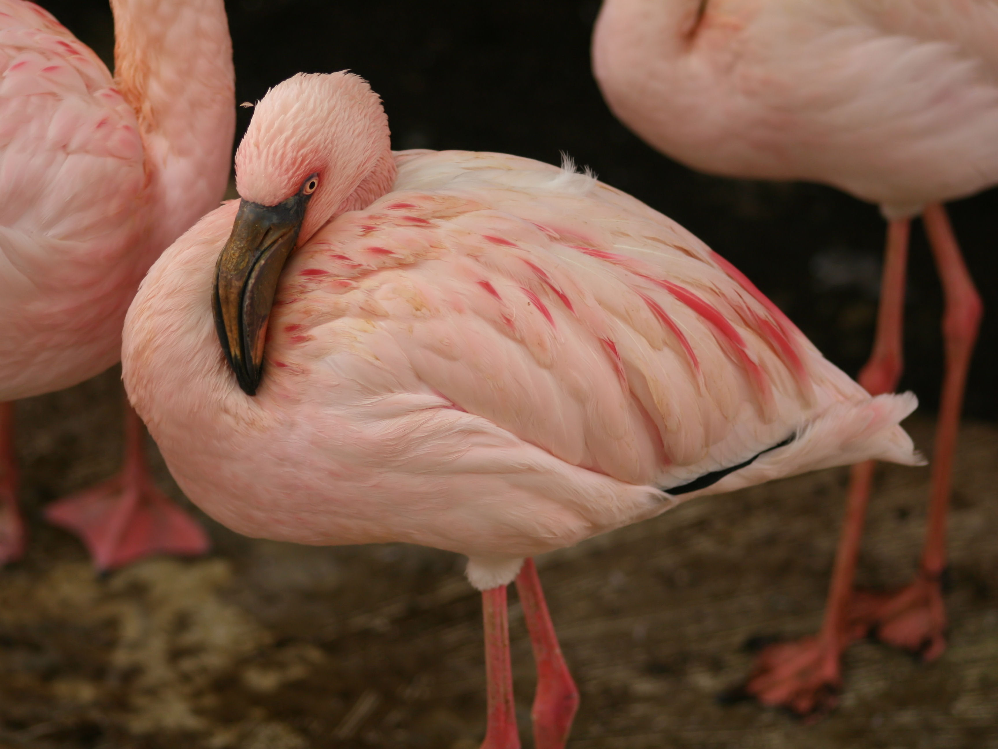 Zwergflamingo im Karlsruher Zoo